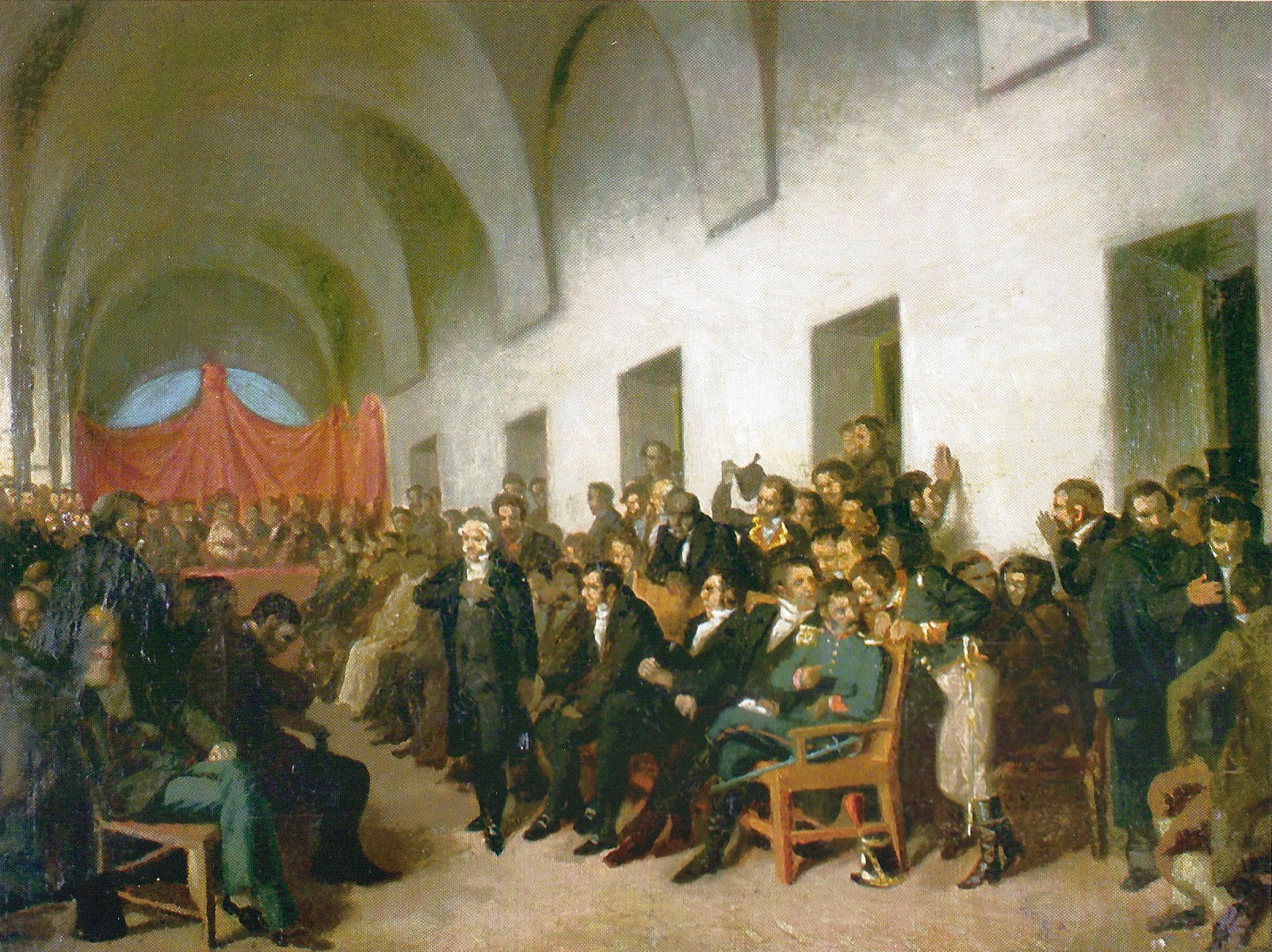 El Cabildo Abierto del 22 de Mayo de 1810 en la ciudad de Buenos Aires, donde se decidió reemplazar al virrey Baltasar Hidalgo de Cisneros por una Junta